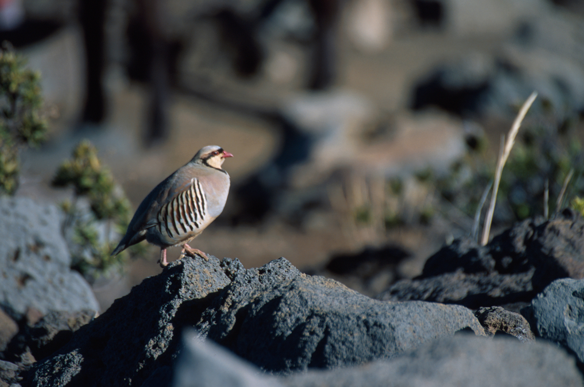 Chukar (Alectoris chukar), Maui, Hawaii.